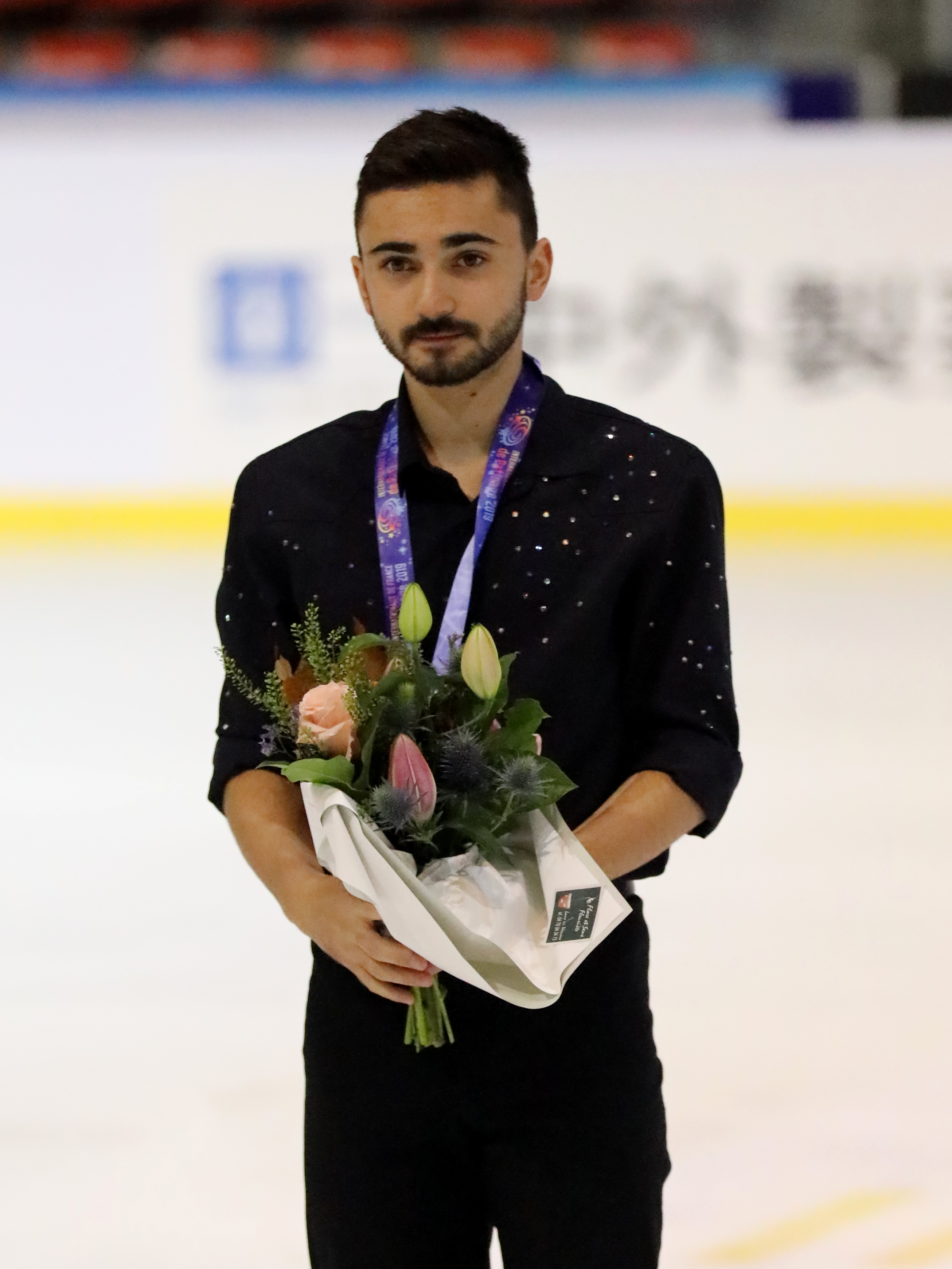 Internationaux de France 2019